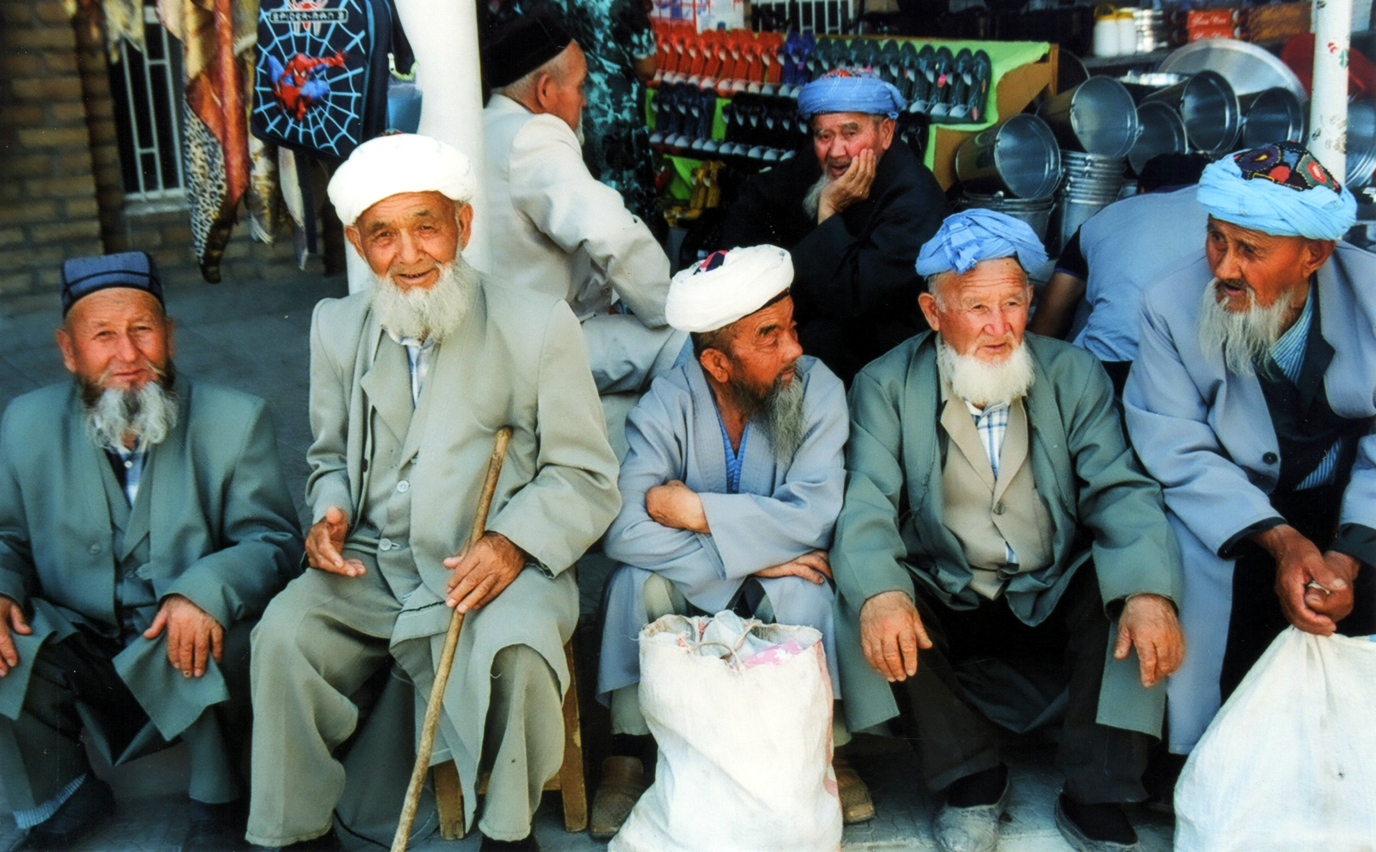 Uzbek people